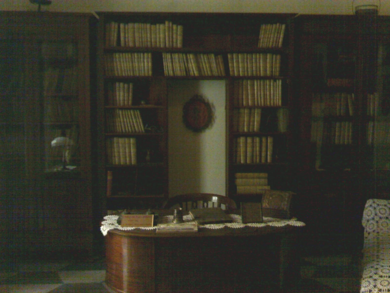 Chiesa del Gesù Nuovo di Napoli - Gli ambienti in cui visse Giuseppe Moscati